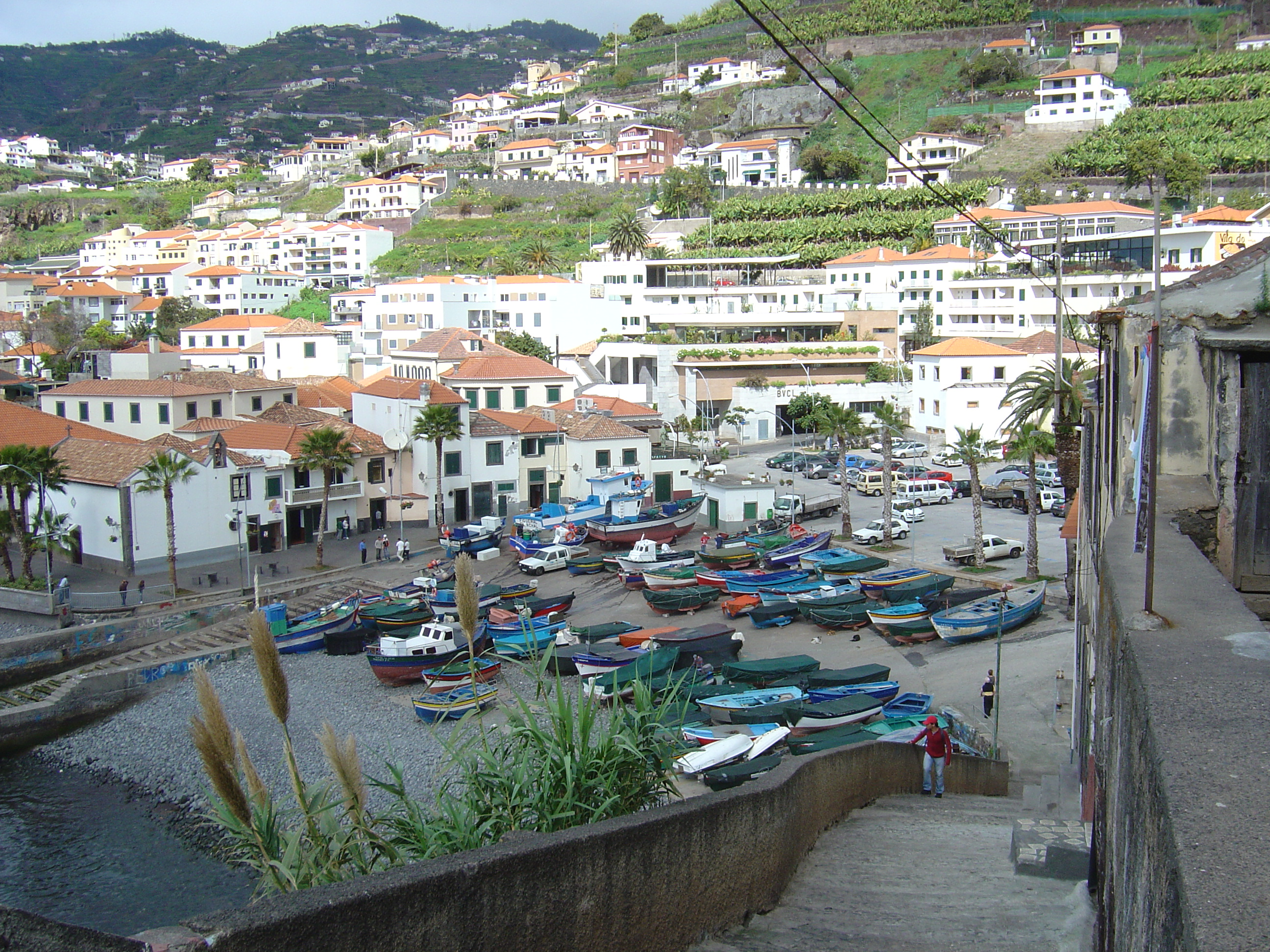 Hafen in Camara de Lobos